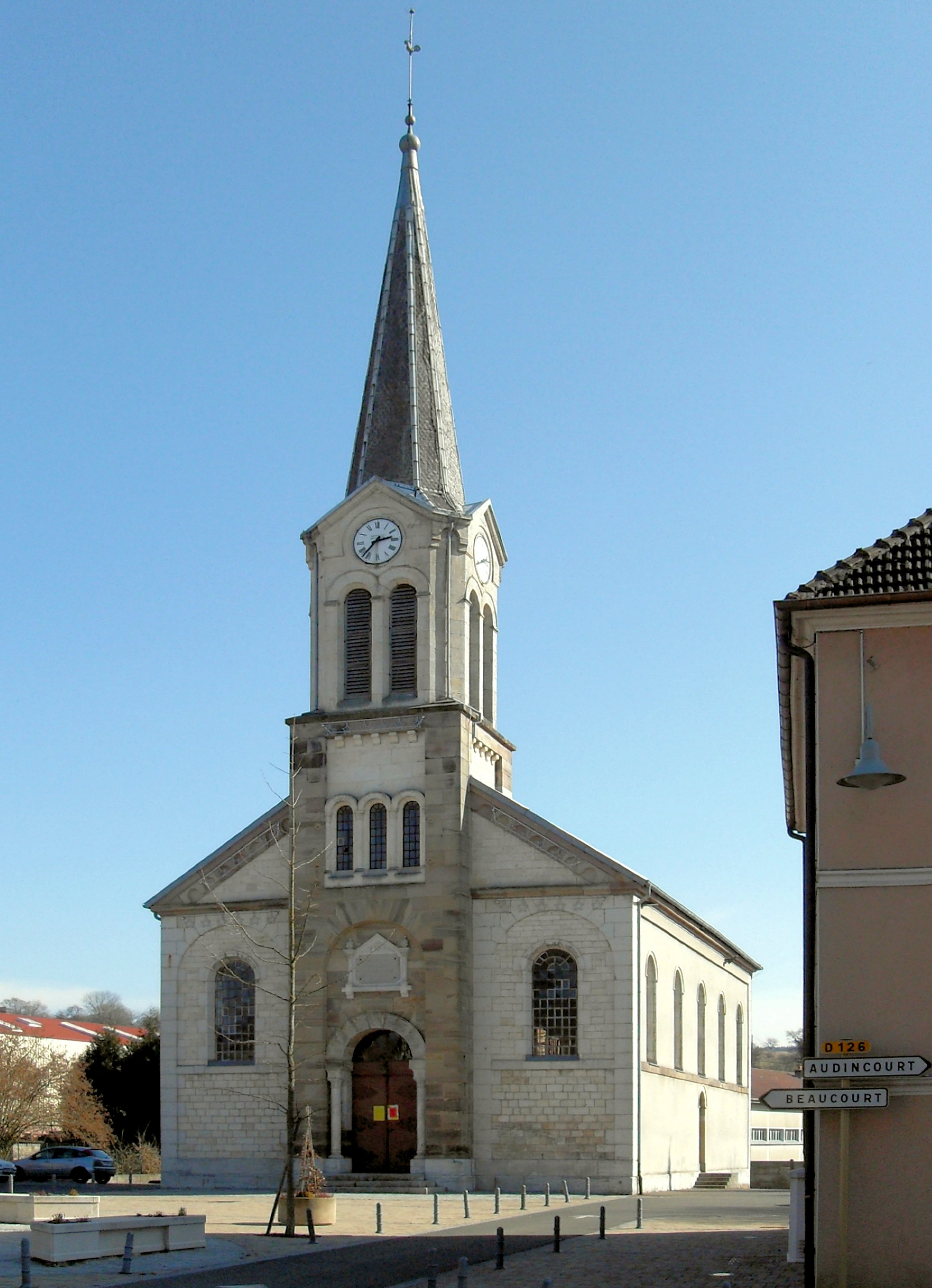 Le temple protestant à Dasle